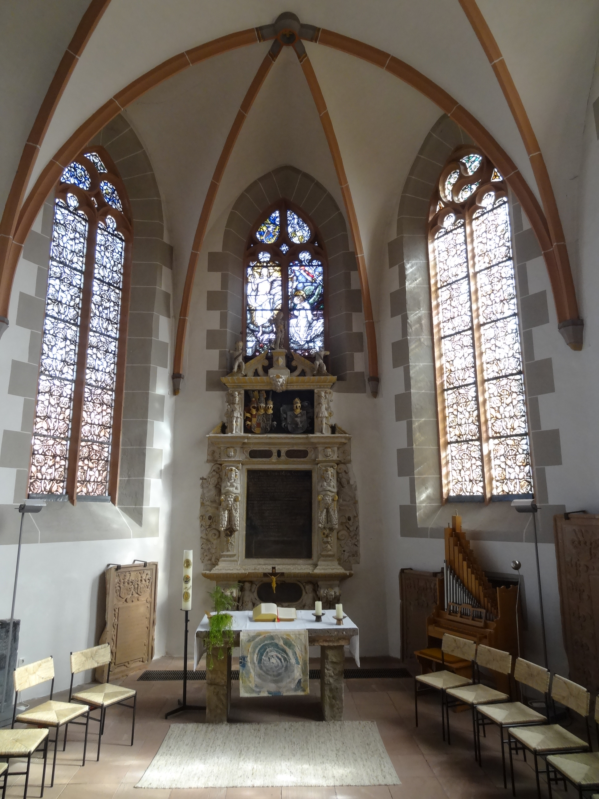 Evangelische Stadtkirche Hungen